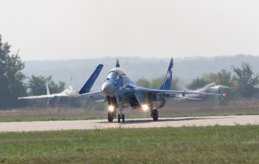 Самолёт МиГ-29КУБ на МАКС-2007